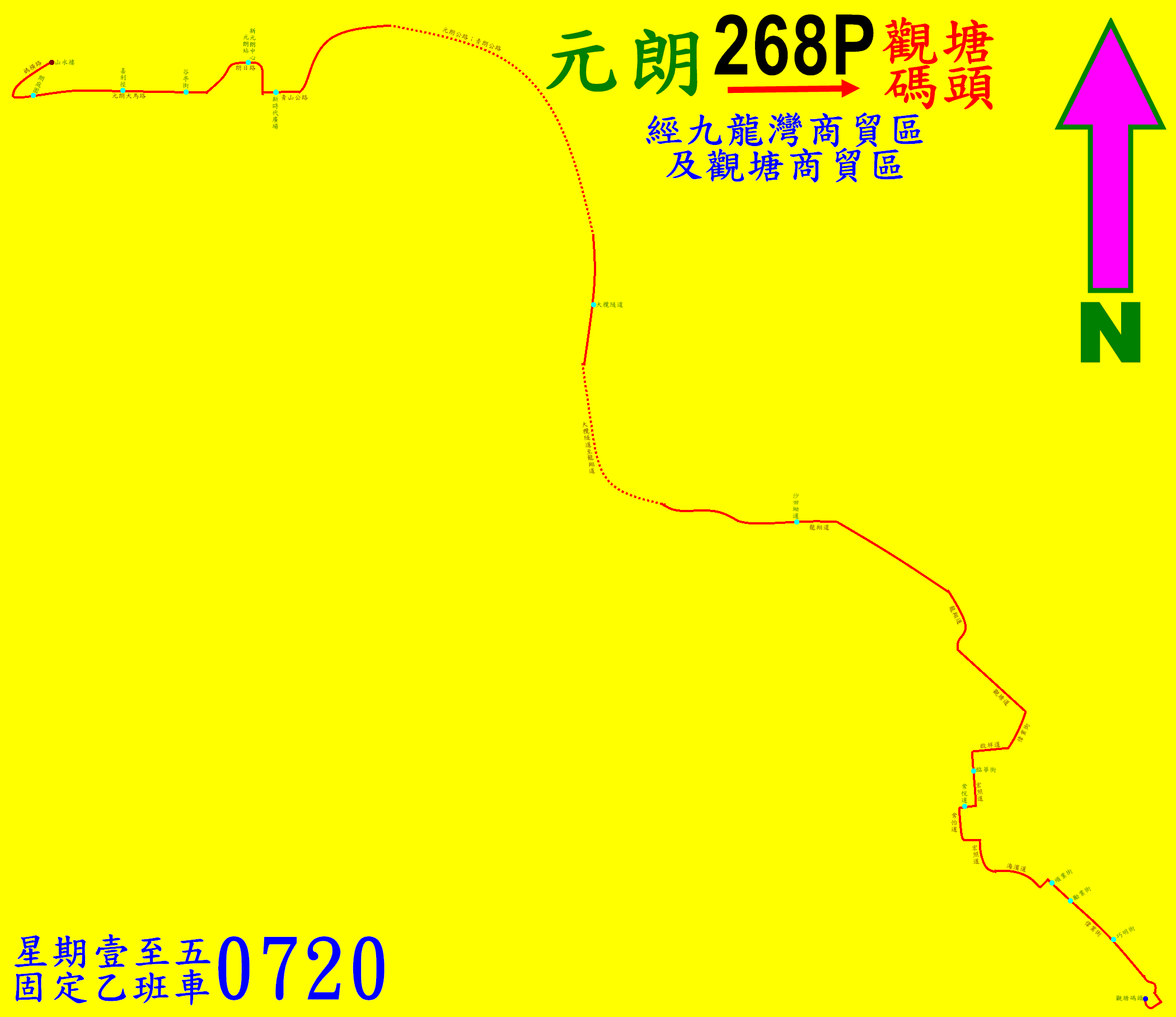 中文（香港）: 九龍巴士268P線的走線圖